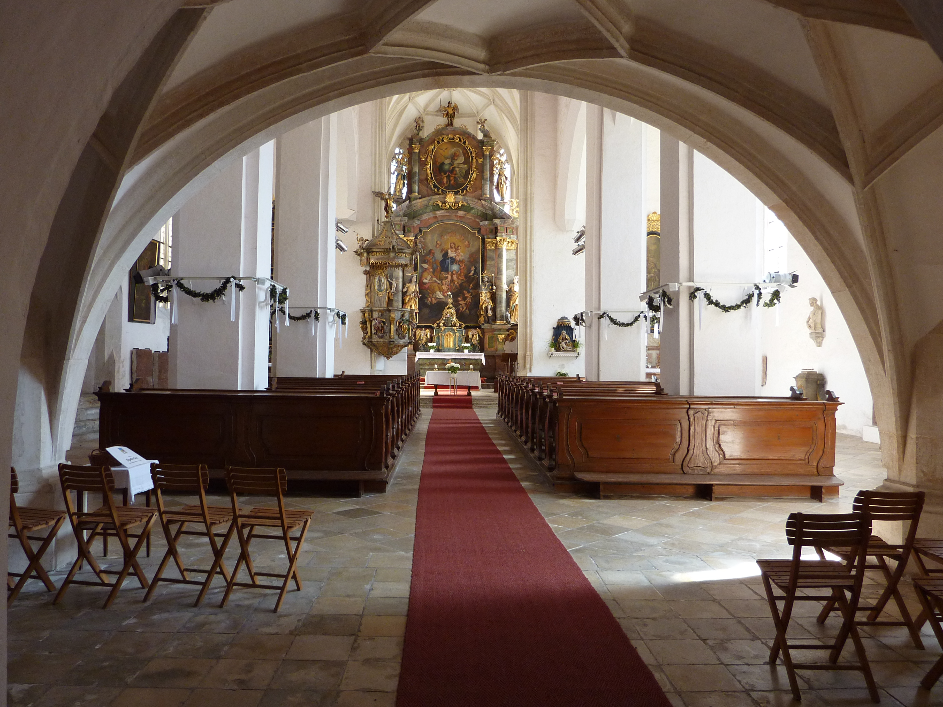 Filialkirche in St. Michael, Weißenkirchen in der Wachau, Niederösterreich / Einblick nach Osten